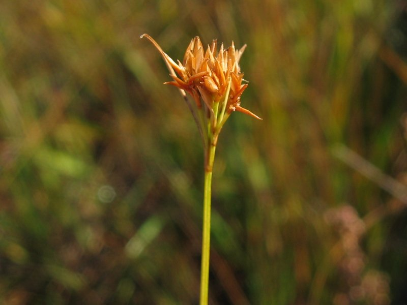 Weißes Schnabelried (Rhynchospora alba), fruchtend